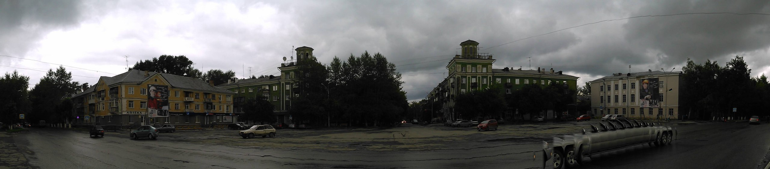 Перекрёсток улиц Ленина и Розы Люксембург, г. Полевской